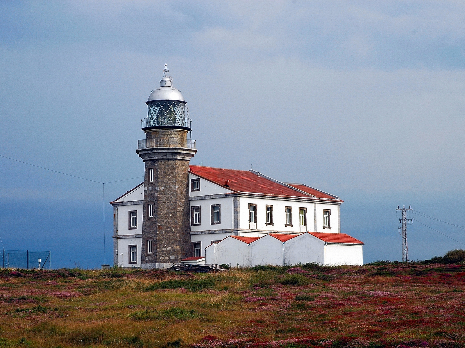 Faro de Peñas Autor: Ramón Noriega